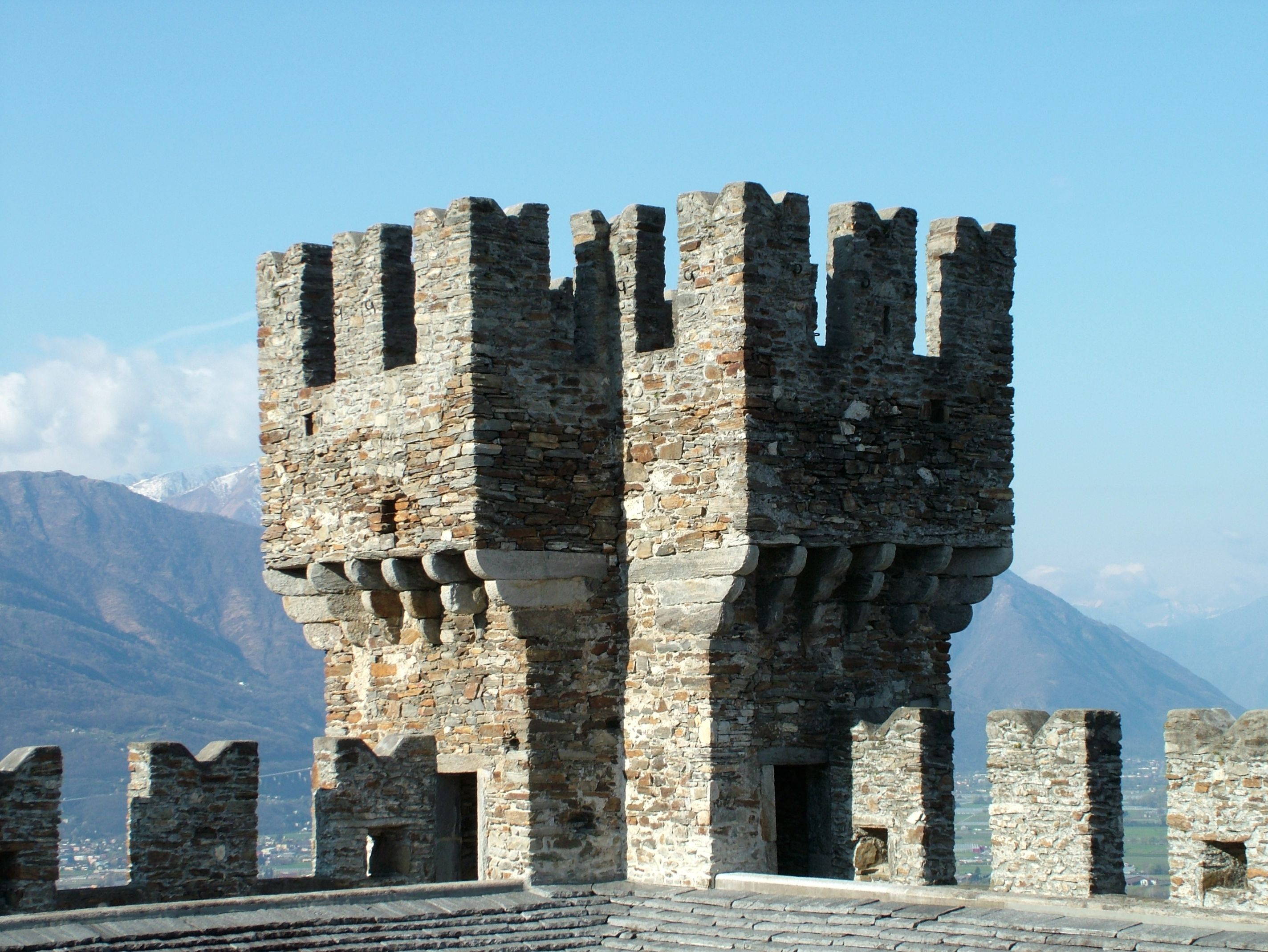 Bellinzona, Castello die Sasso Corbaro, der Turm